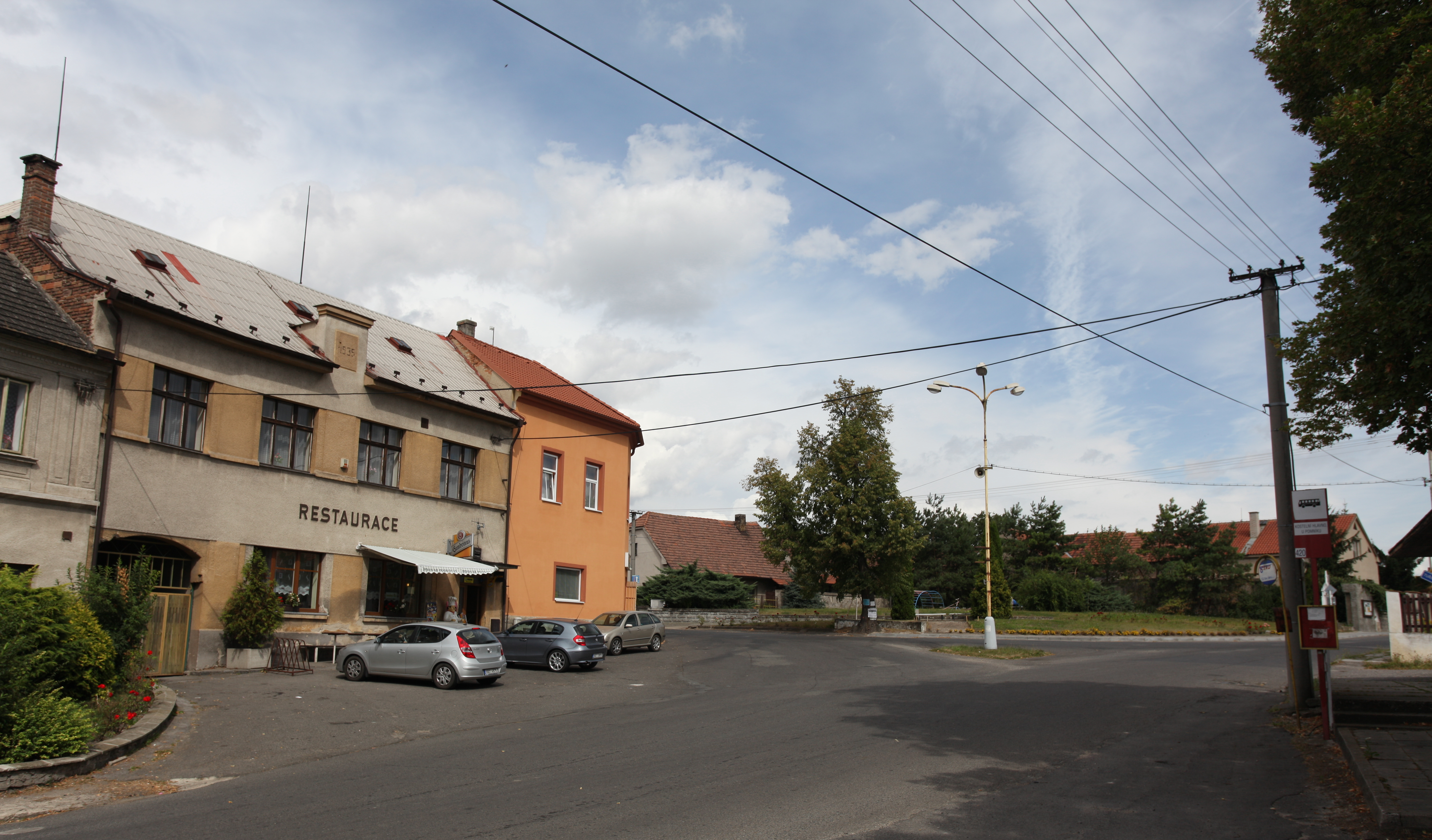 Kostelní Hlavno, rozcestí u hostince